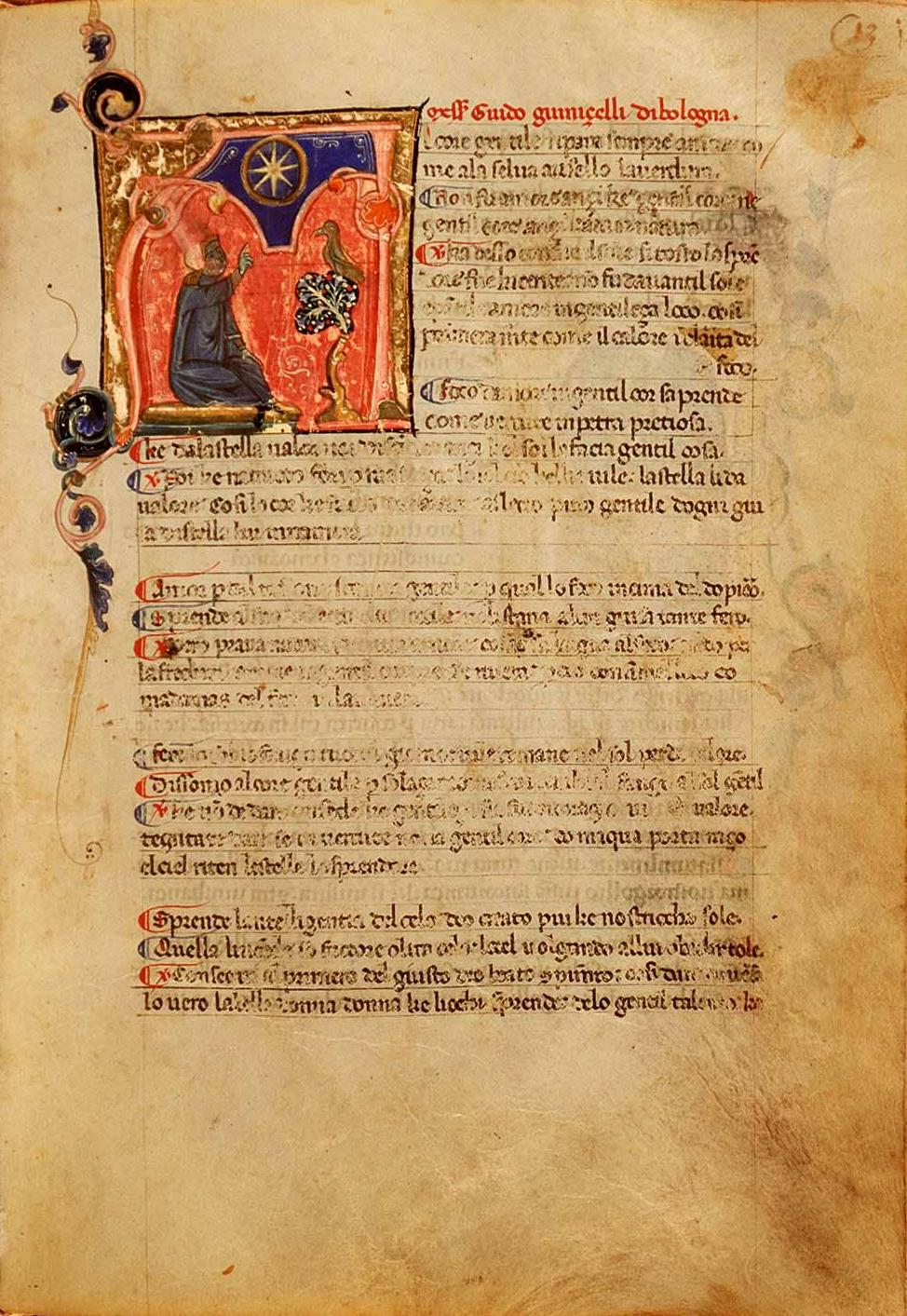 Codice Banco Rari 217 f. 34r: Guido Guinizelli, "Al cor gentil rempaira sempre amore", Firenze, Biblioteca Nazionale